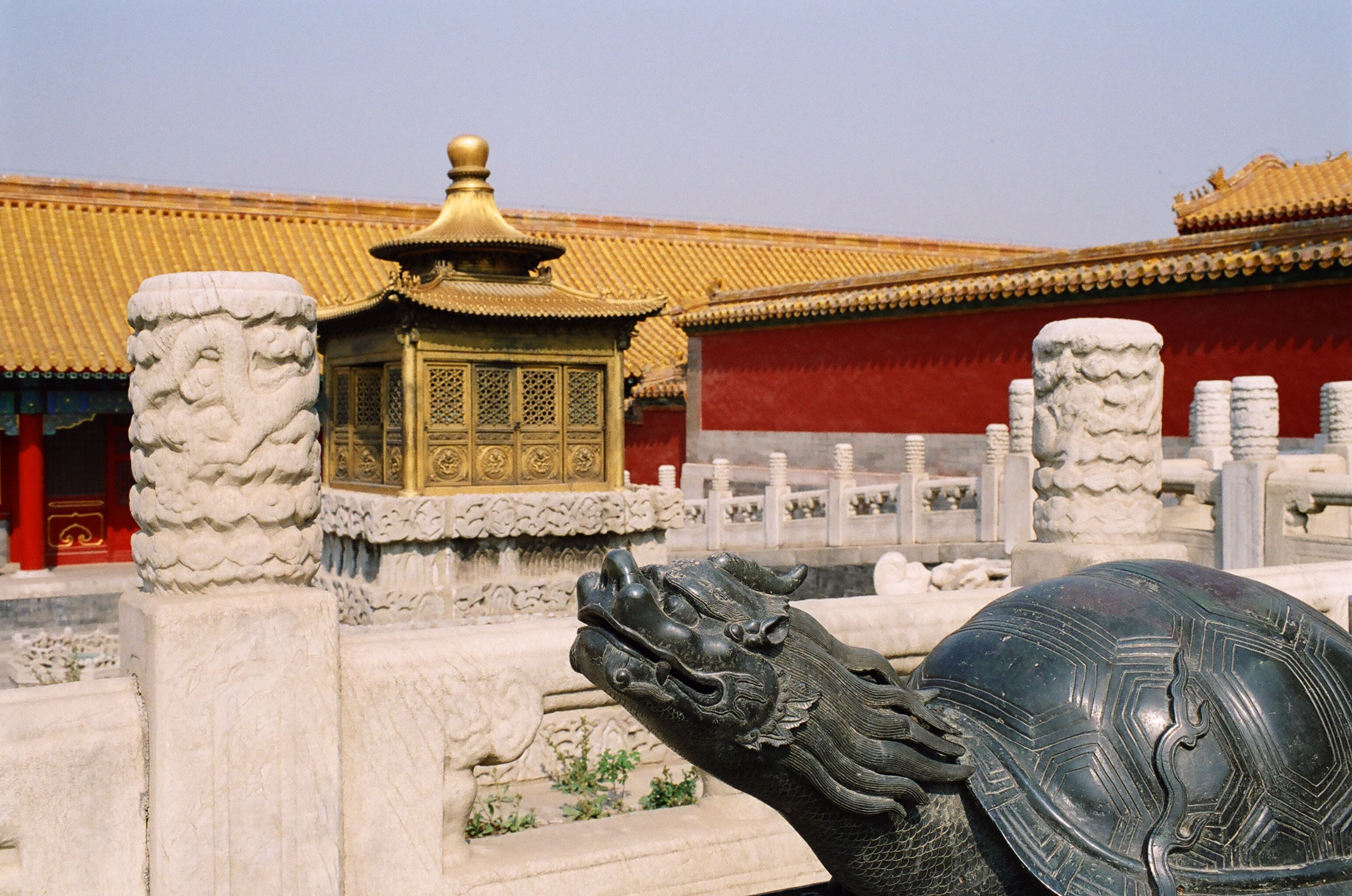 Zijincheng (Forbidden City), Beijing